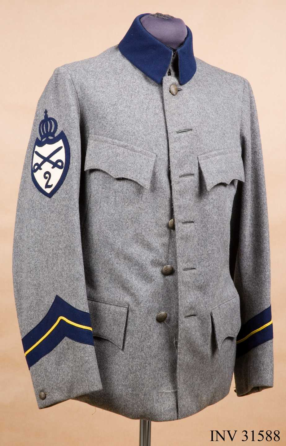 Vapenrock m/1906 Identifikationsnr: AM.031588 Samling: Armémuseum